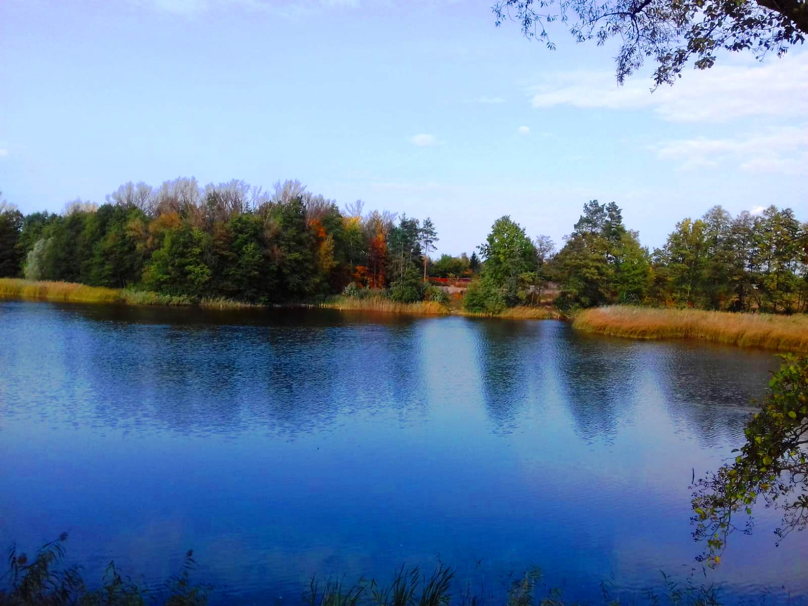 Staw Nagus w Toruniu1